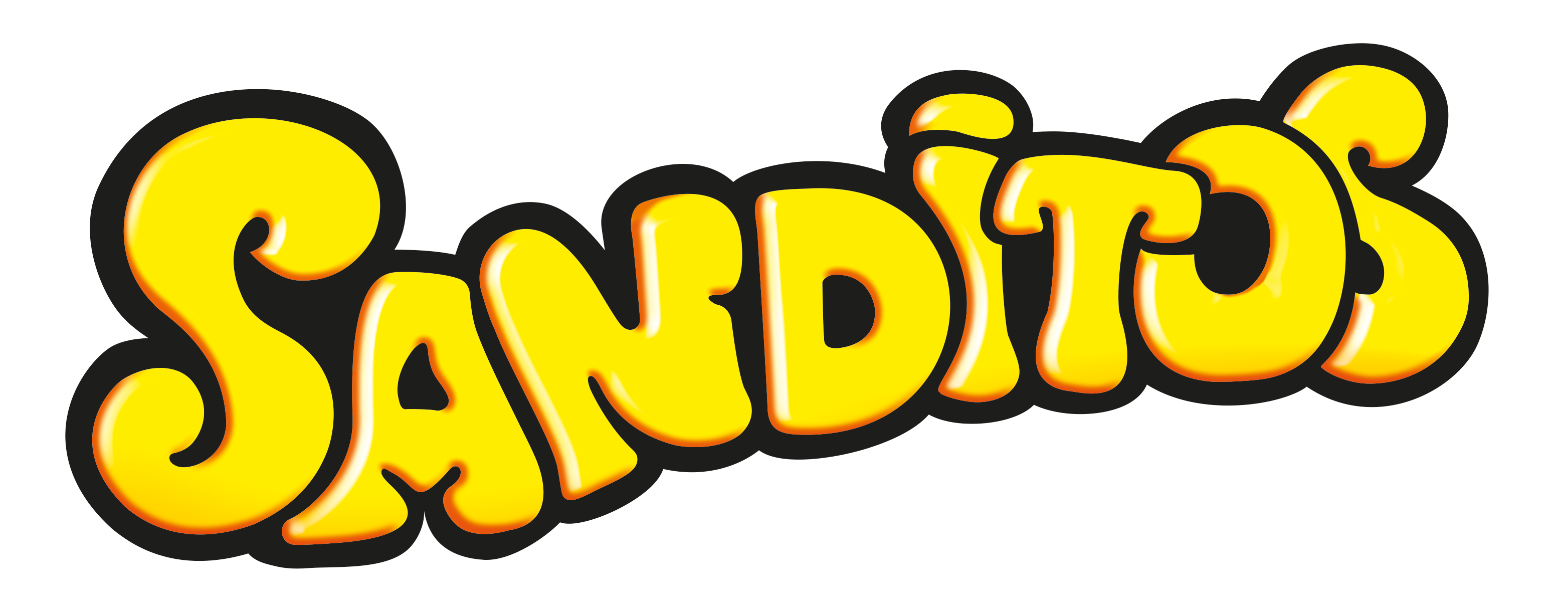 Sanditos